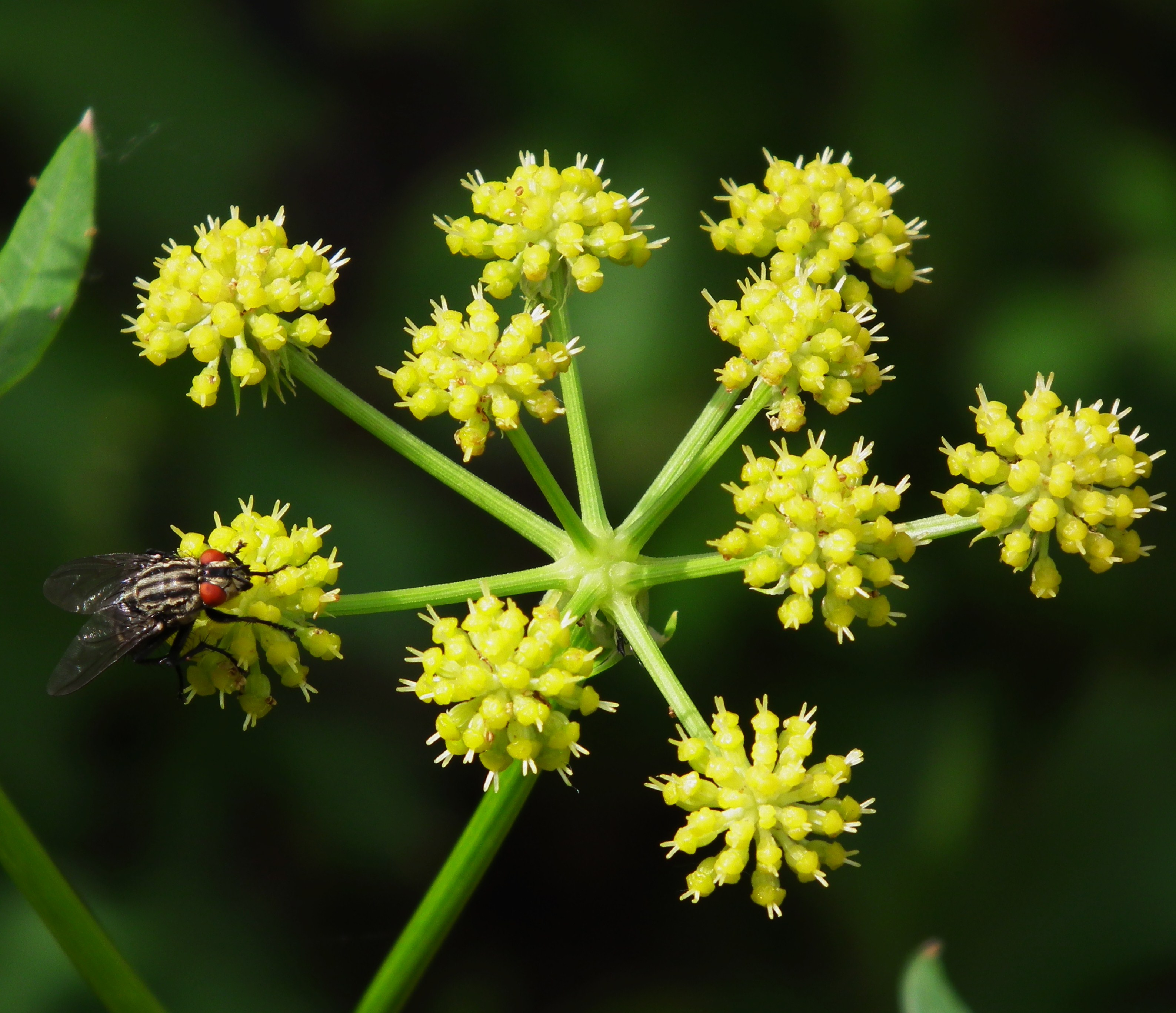 Insekt auf Liebstöckel (Levisticum officinale), fotografiert in Nordbaden (Deutschland)